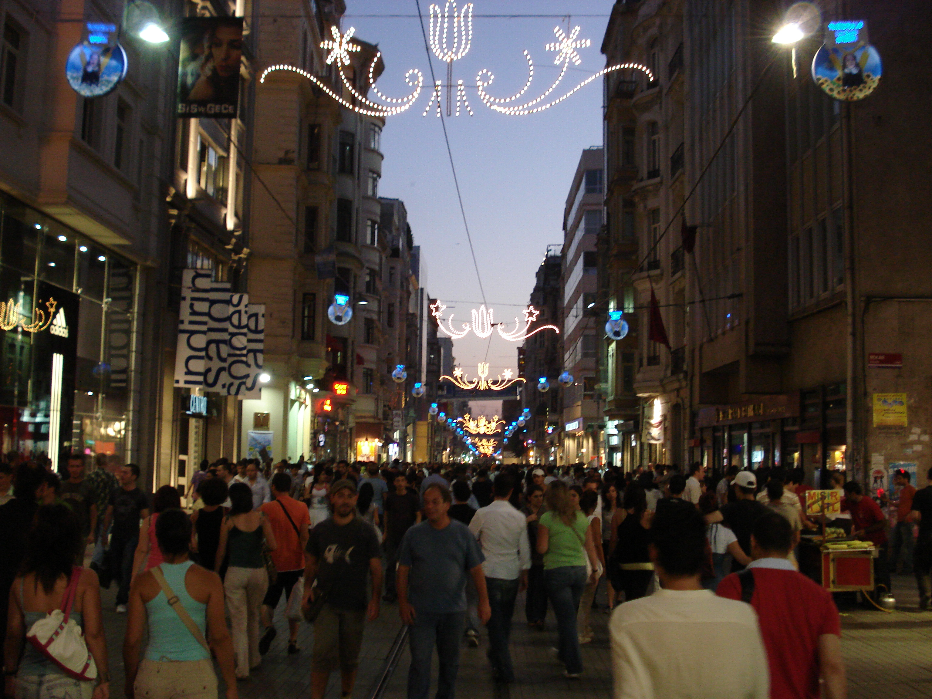 İstiklal Street in Beyoğlu in İstanbul